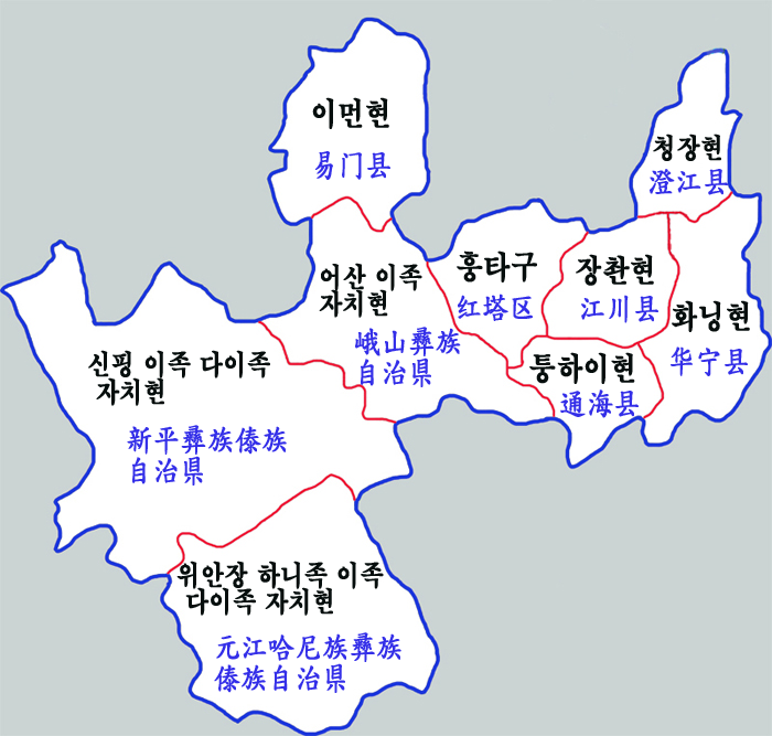 위시시 현급행정구역도